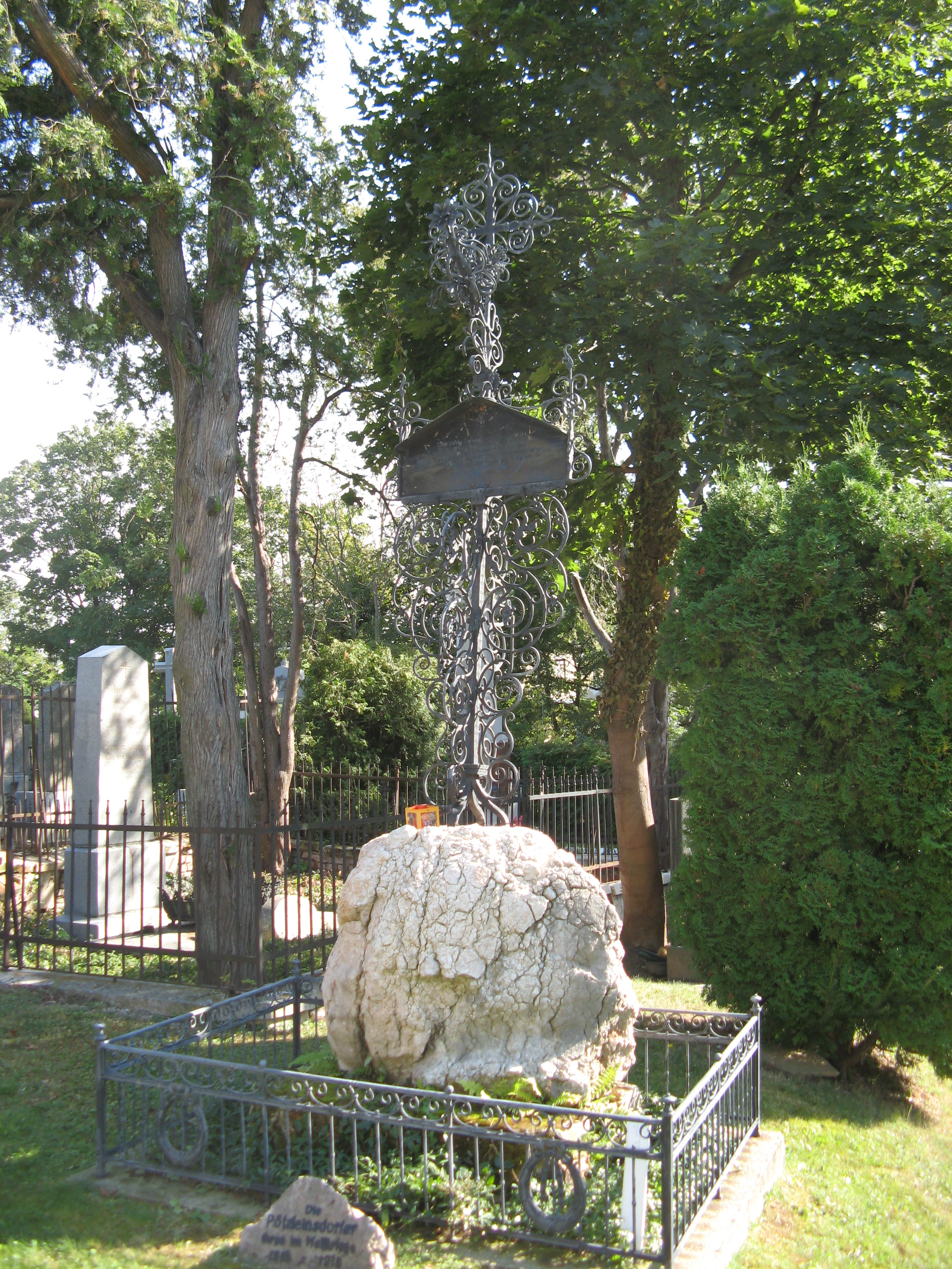 Wien, Pötzleinsdorfer Friedhof, Kriegerdenkmal